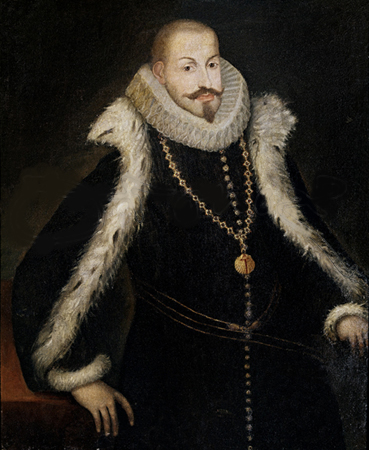 Pedro Fernandez de Castro, VII Count of Lemos